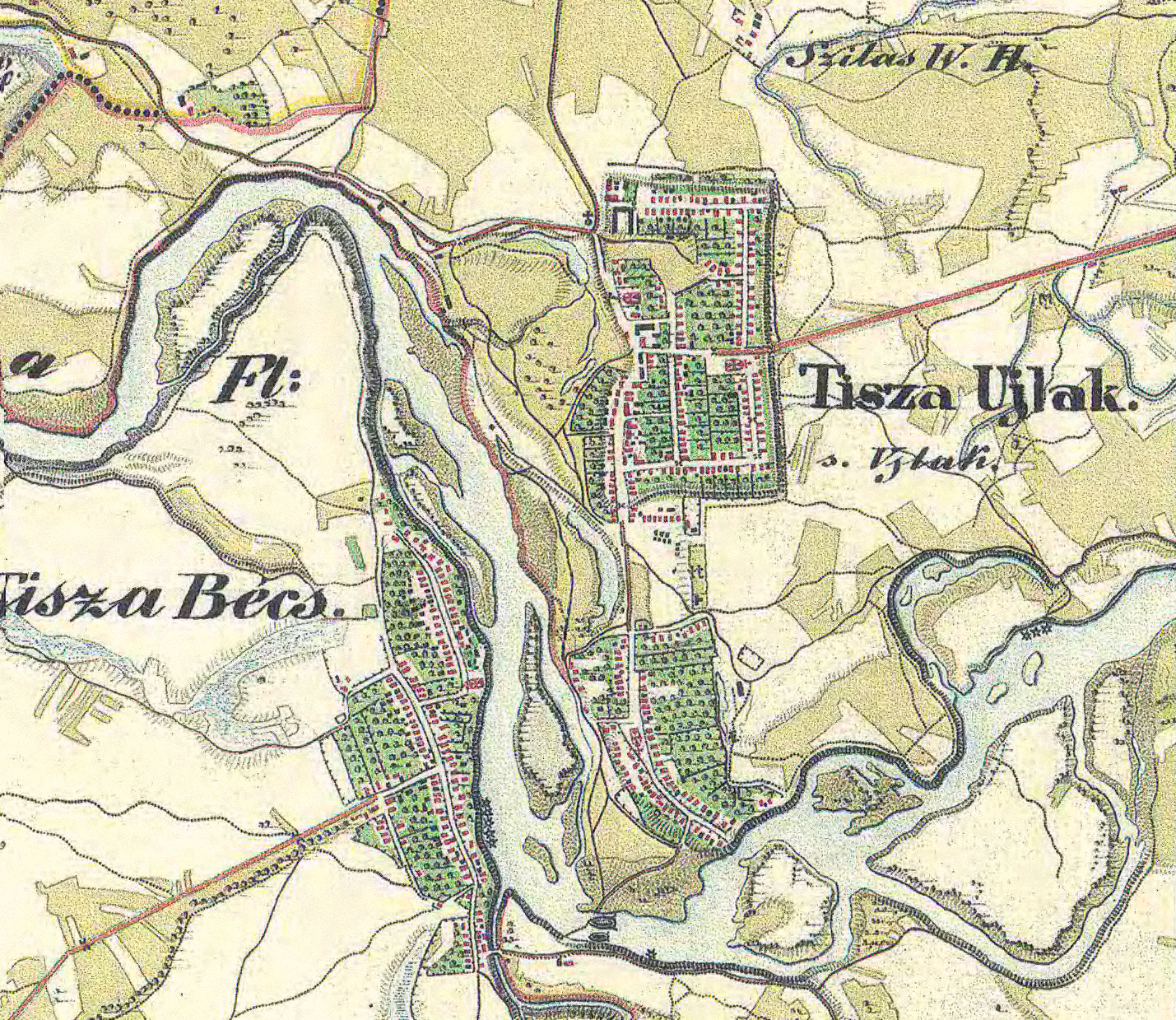 Tiszaújlak és környéke 1806–64 között. Franciskánus topográfiai térkép, eredeti méretaránya 1:28800